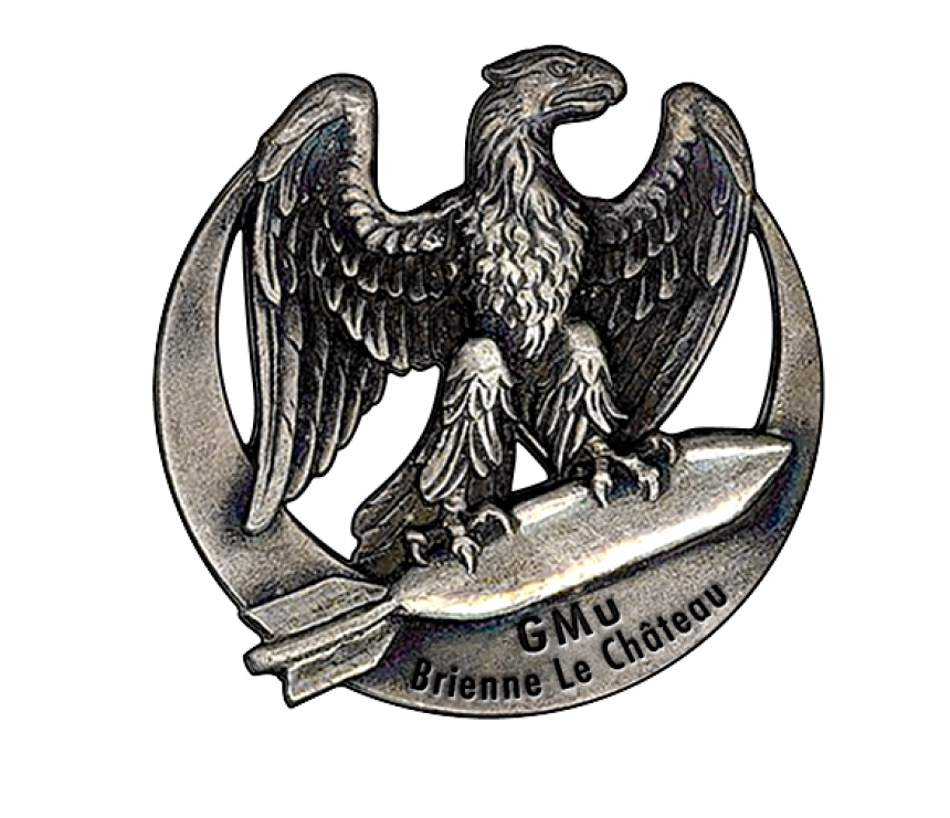 Héraldique : Croissant de fer chargé en abîme d’un aigle napoléonien contourné de même tenant en ses serres une bombe de même. Symbolique : L’aigle impériale rappelle le lien avec la ville de Brienne Le Château, terre ayant abritée Napoléon lors de son cursus académique et militaire. La Lune en héraldique symbolise la connaissance indirecte, c’est-à-dire théorique conceptuelle et rationnelle. La bombe tenue dans les griffe de l’aigle rappelle la finalité de l’engagement du métier de pyrotechnicien.